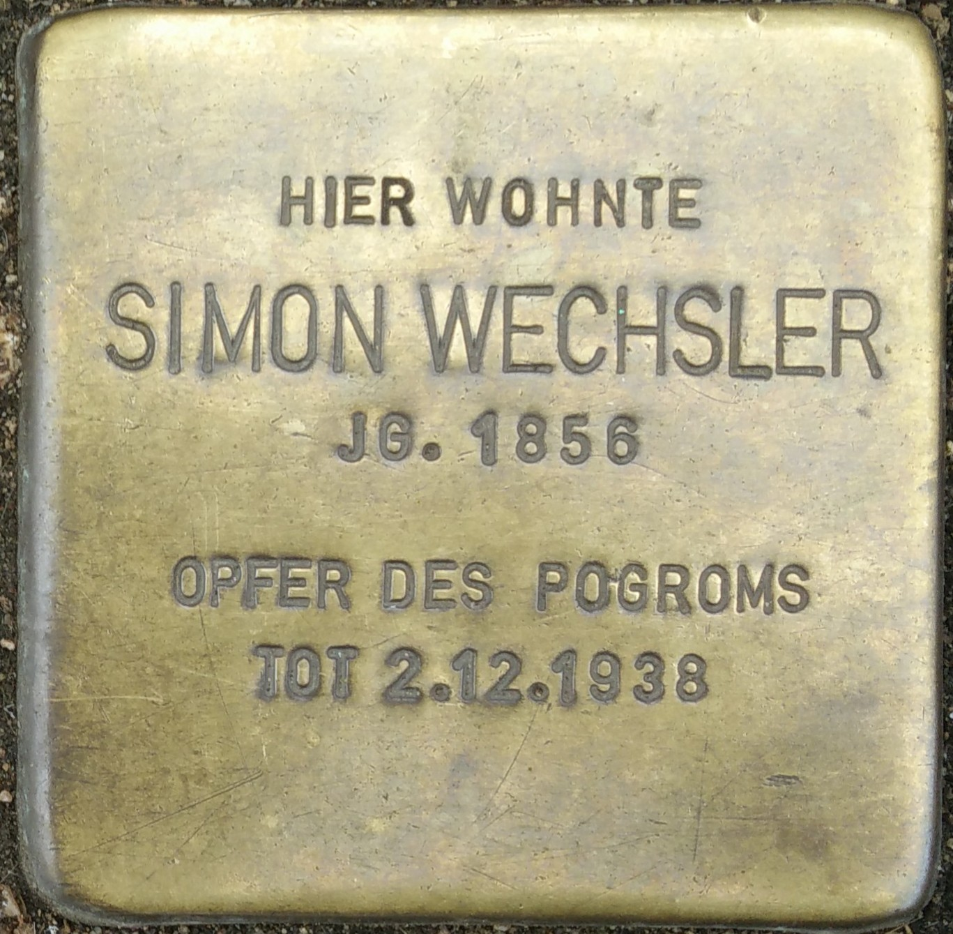 Bad Vilbel, Stolperstein Simon Wechsler